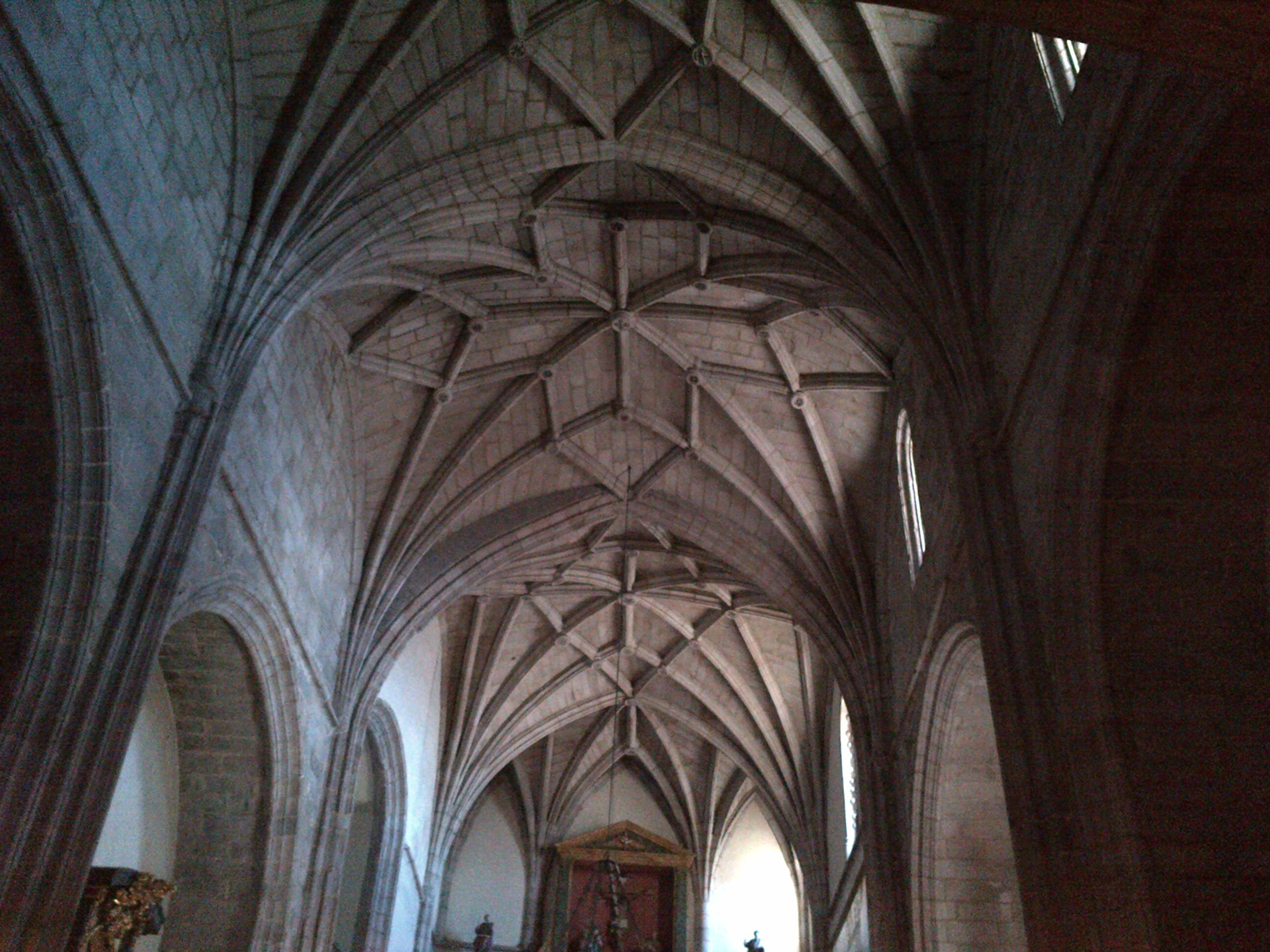 bóvedas